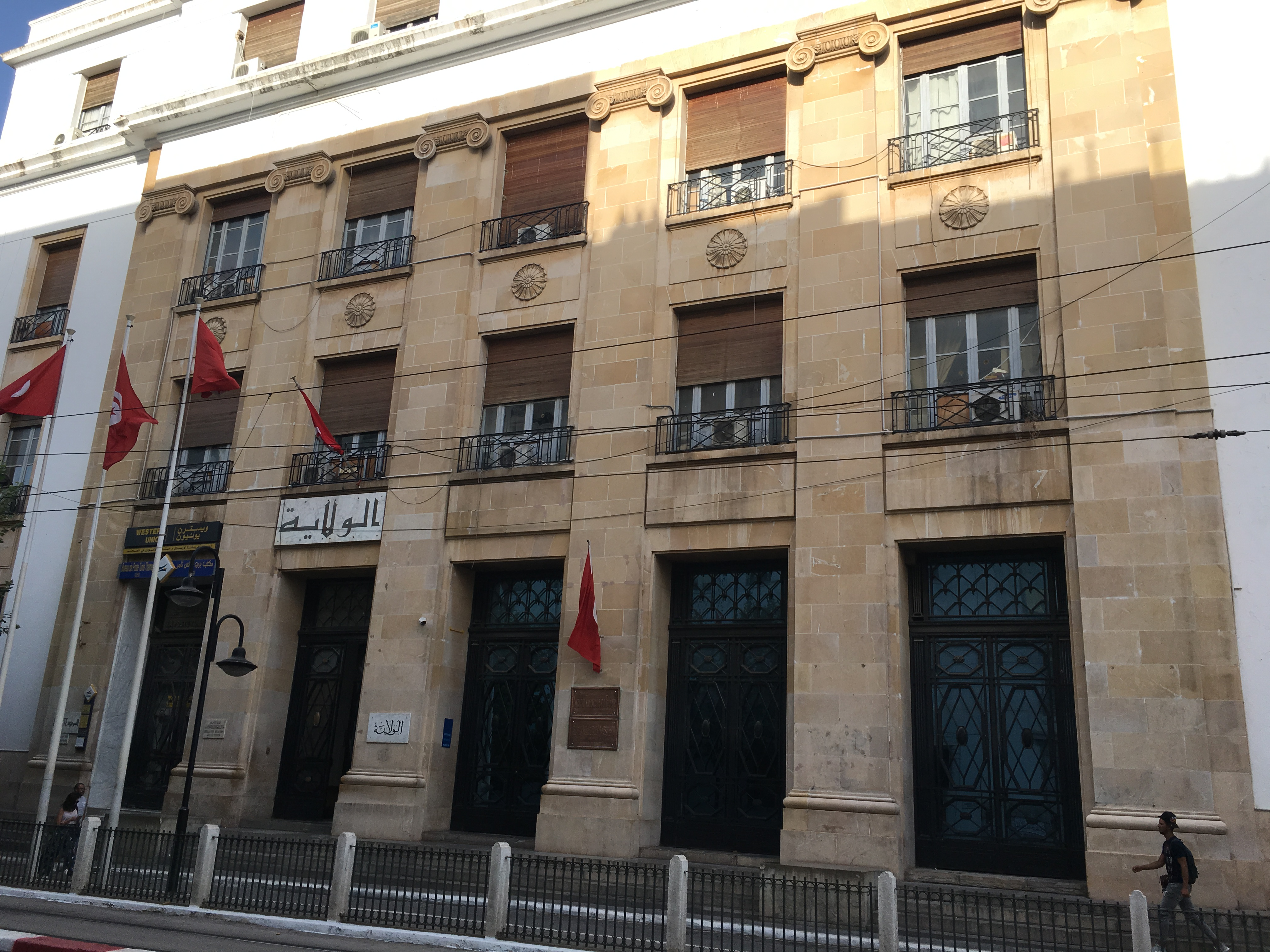 Siège du Gouvernorat de Tunis, Tunis, 2019